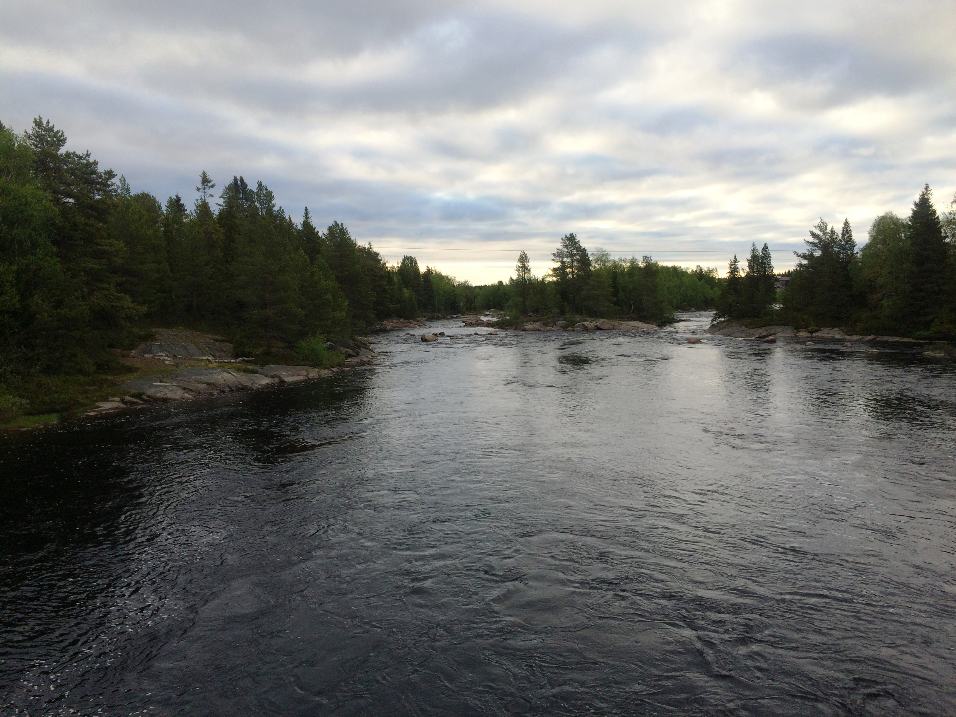 река Поньгома